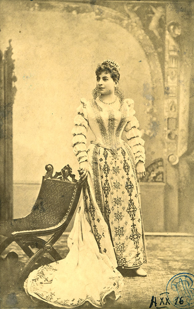 Fotografie tip cabinet, pe hartie albuminata, lipita pe carton negru. Autor necunoscut, probabil sec. XIX. In colectia Bibliotecii Academiei Romane, Cabinetul de Stampe.